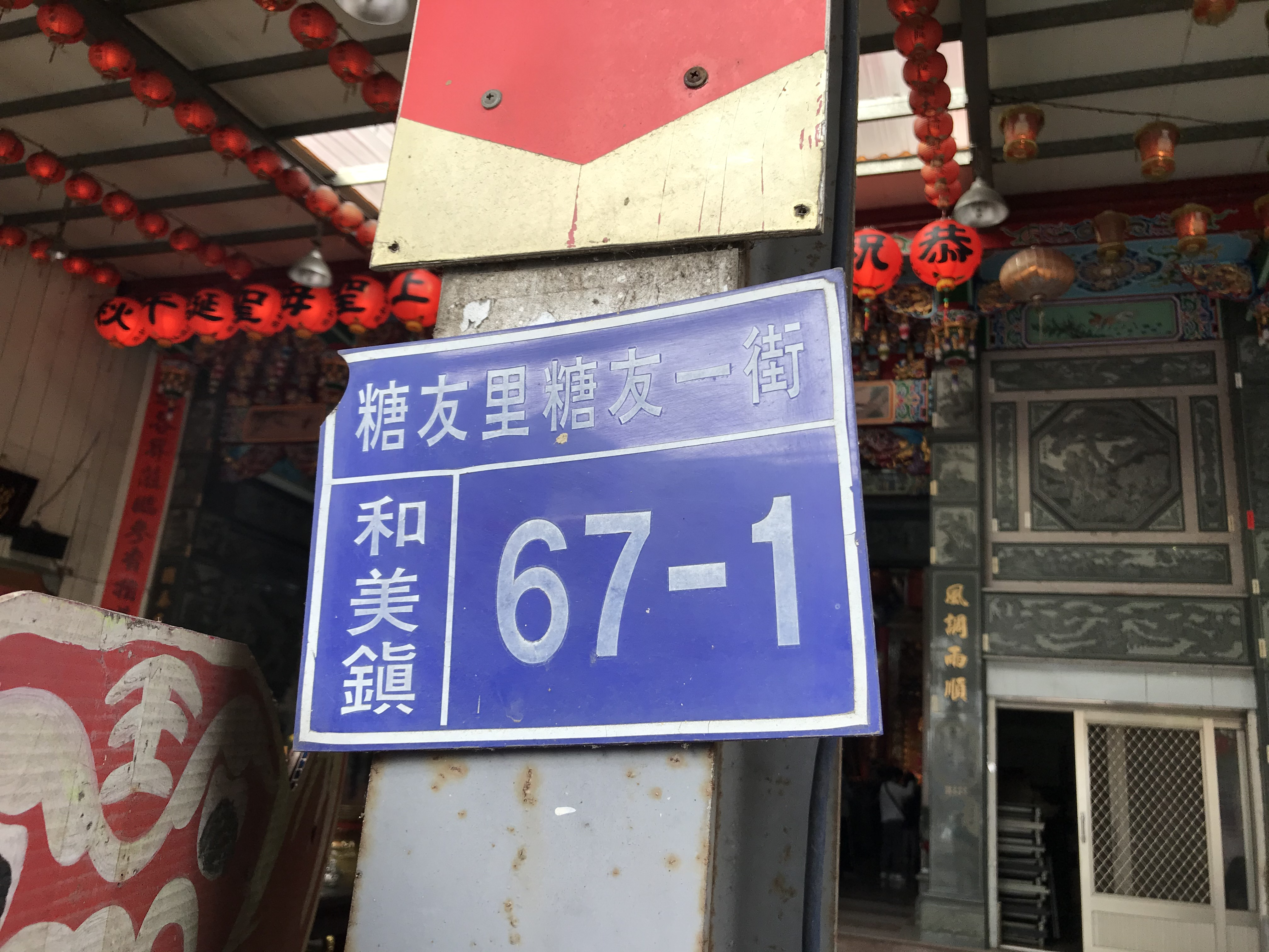 糖聖宮門牌